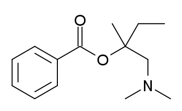 amylocaine